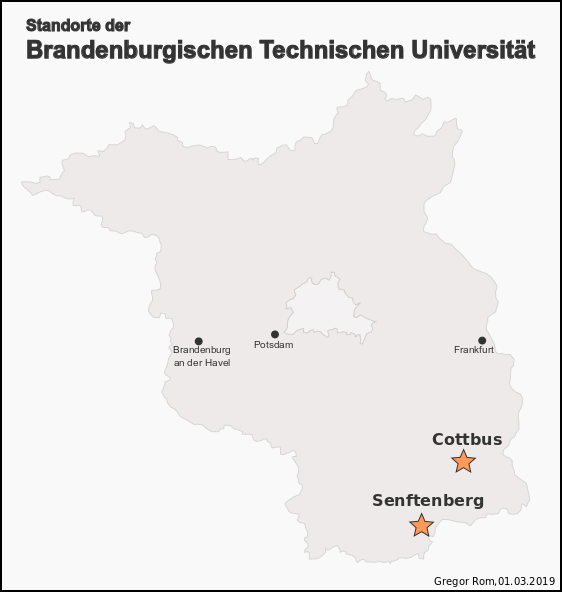 Standorte der BTU